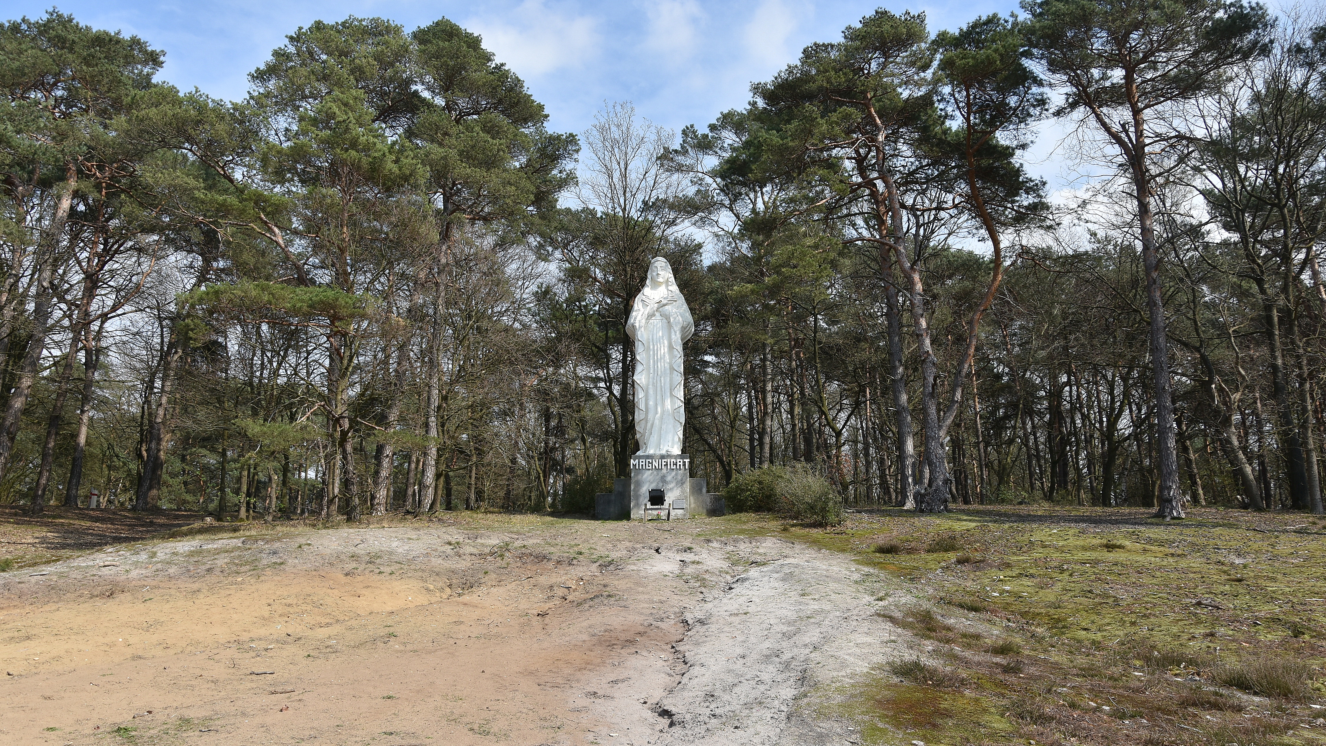 Mariabeeld (Eduard Nulens 1954) Hesselsberg 5-04-2019